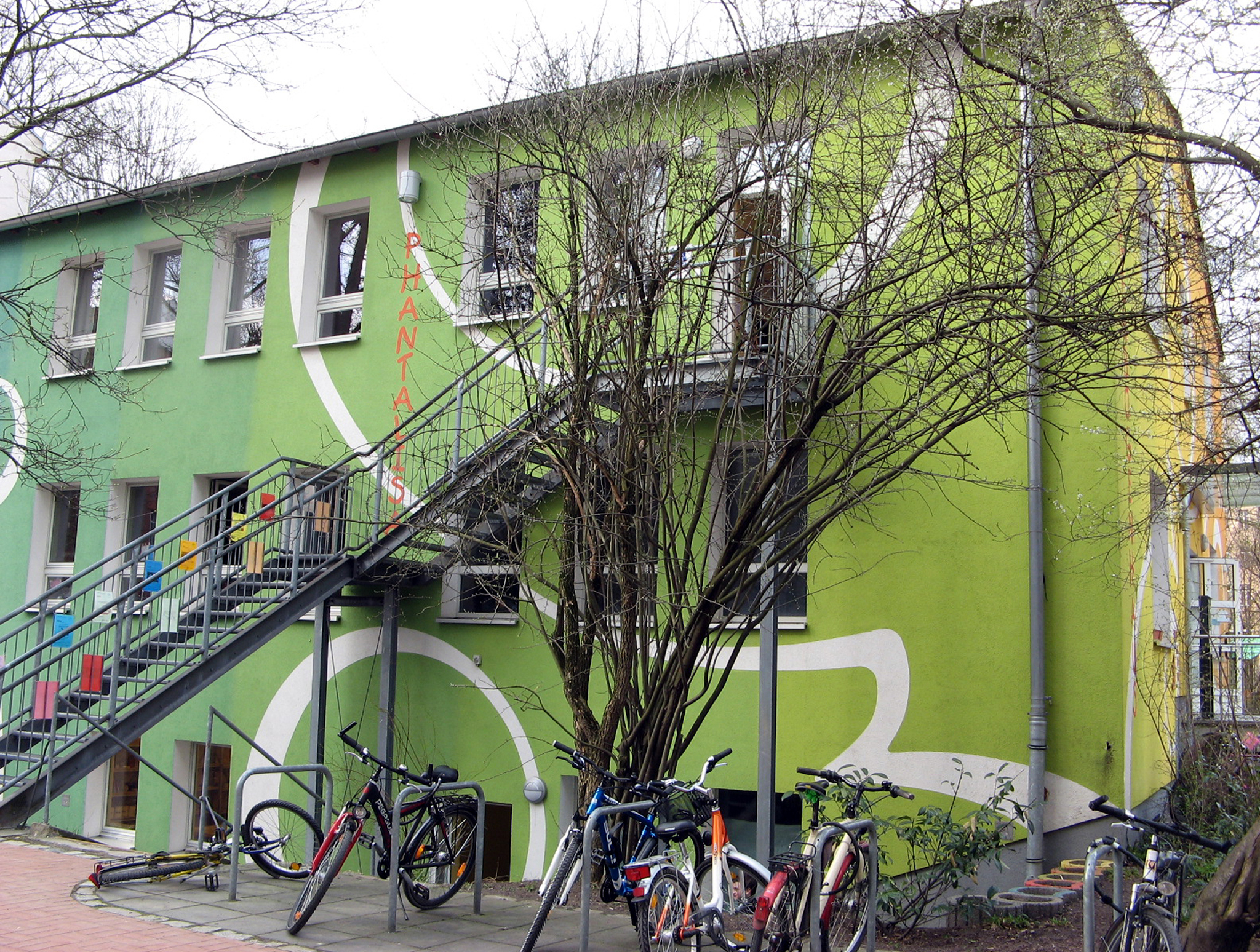 Die Einrichtung für Mädchen ab 6 Jahre und junge Frauen bis 21 Jahre Phantalisa im Obergeschoss des Hauses Kadiner Straße 9 ist über diese Treppe an der Südfassade zu erreichen. Die seit 1991 bestehende Einrichtung zog 2001 aus der Bänschstraße am Forckenbeckplatz in die Kadiner Straße. Ihr Träger ist das FRIEDA-Frauenzentrum e.V. in der Proskauer Str. 7, 10247 Berlin. Die Arbeit von Phantalisa wird von der Kinder- und Jugendförderung des Bezirksamtes Friedrichshain-Kreuzberg finanziert.